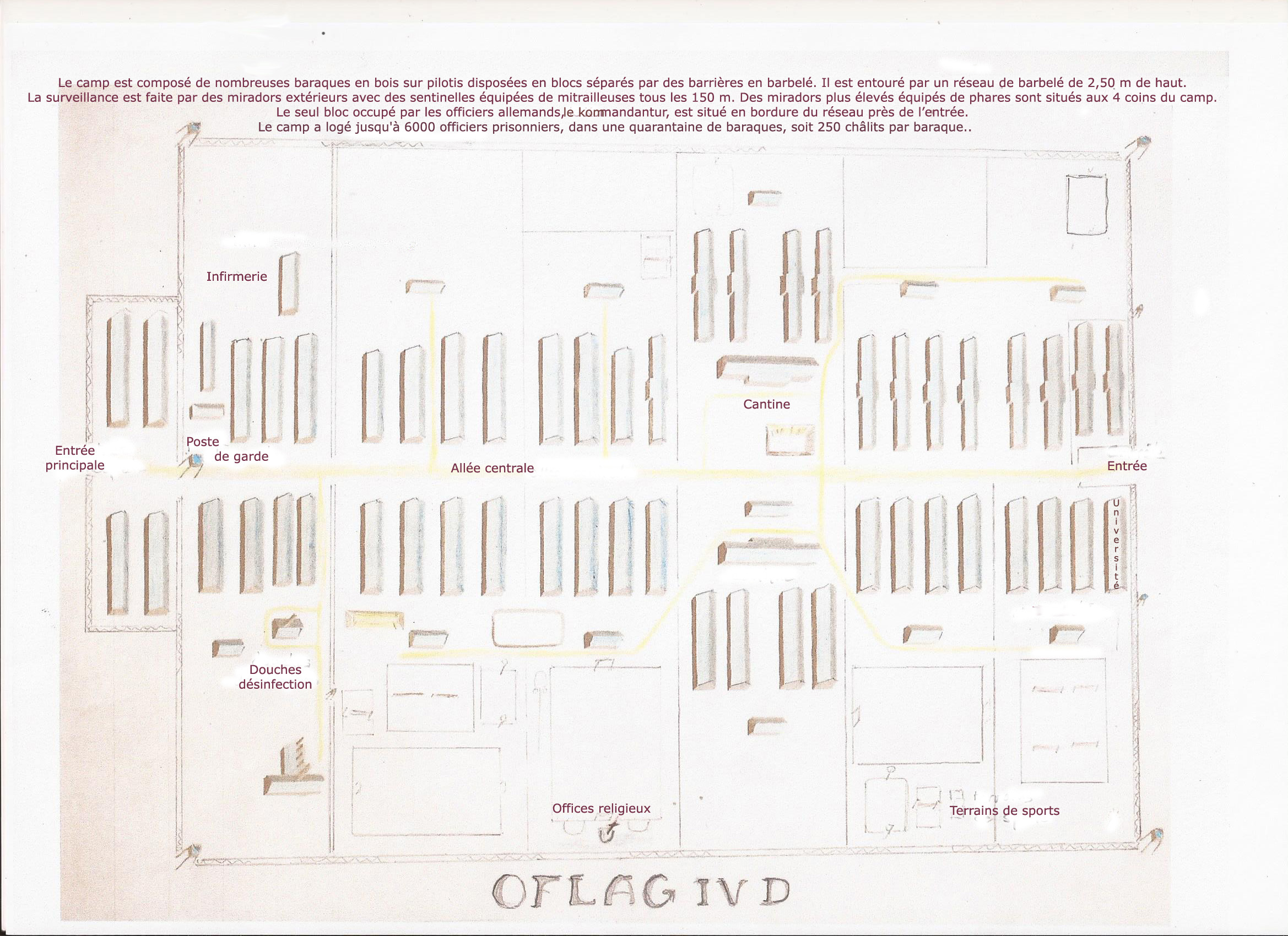 Plan légendé de l'oflag IV D